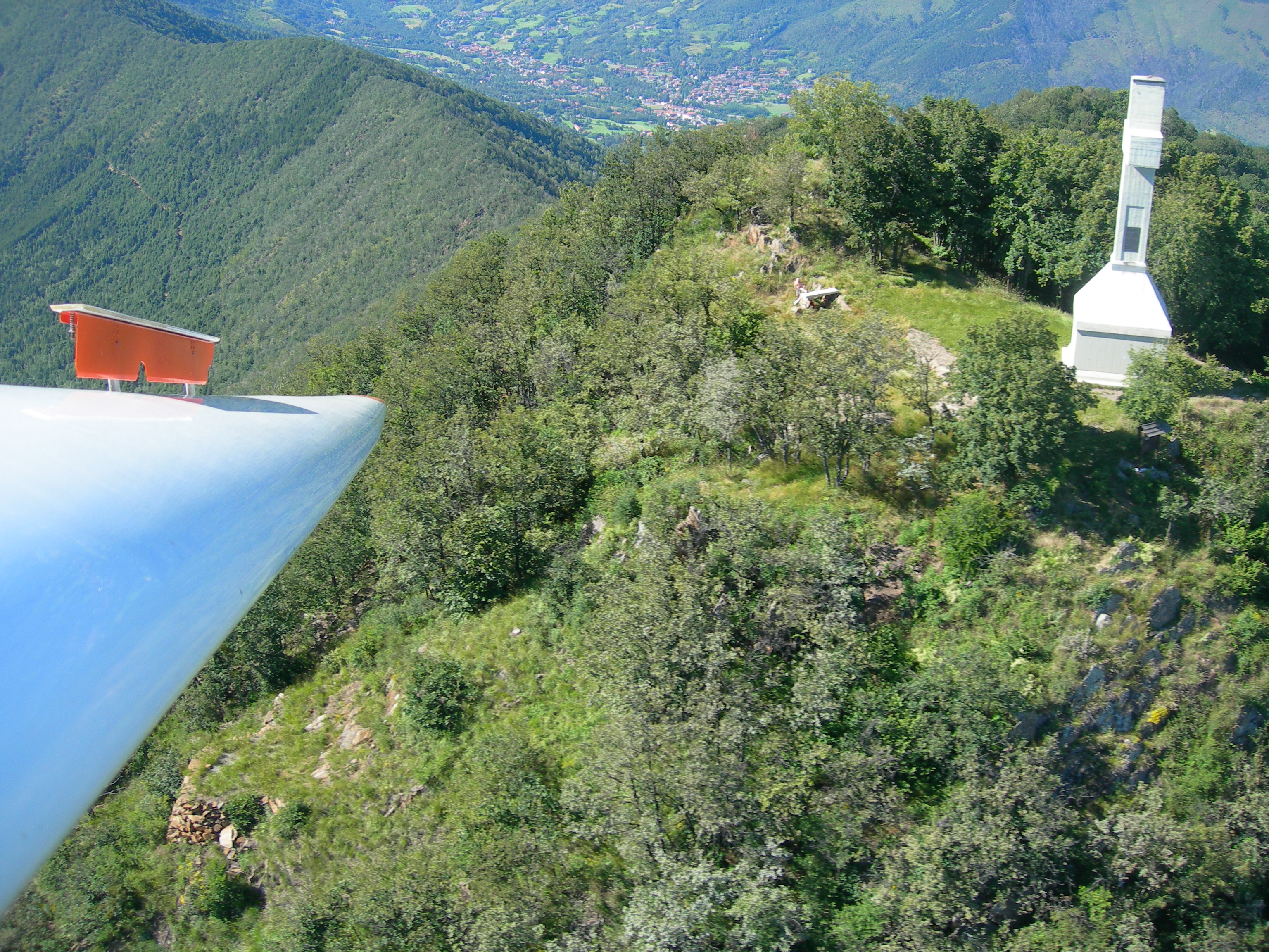 Aliante in volo di pendio sul Monte Musinè, nei pressi di Torino. Si notano i diruttori (arancioni) aperti sulle ali per perdere quota per tornare all'aeroporto rapidamente. Licensing Ho scattato personalmente questa foto, che è di pubblico dominio.